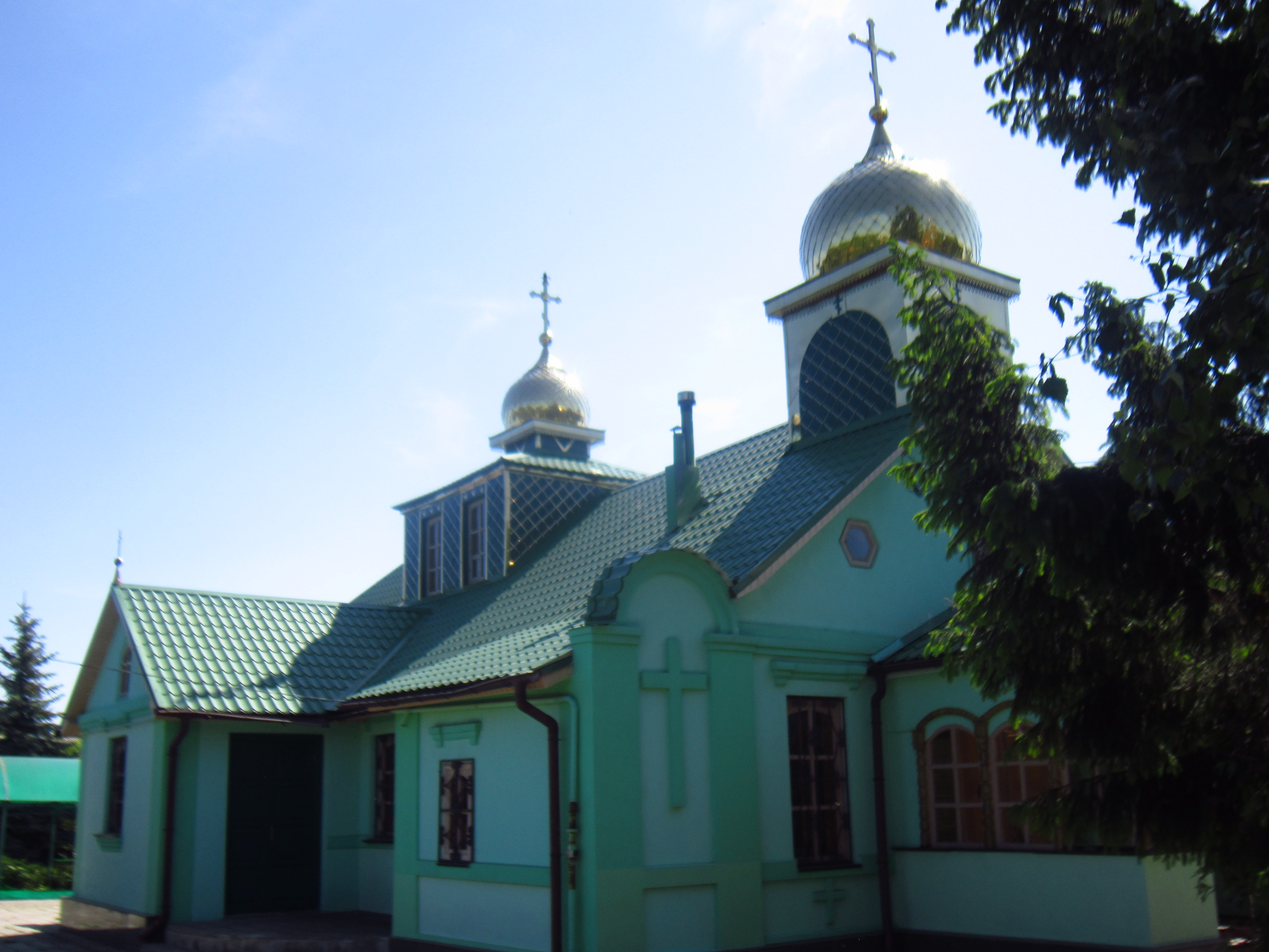 Духівська церква, Південне